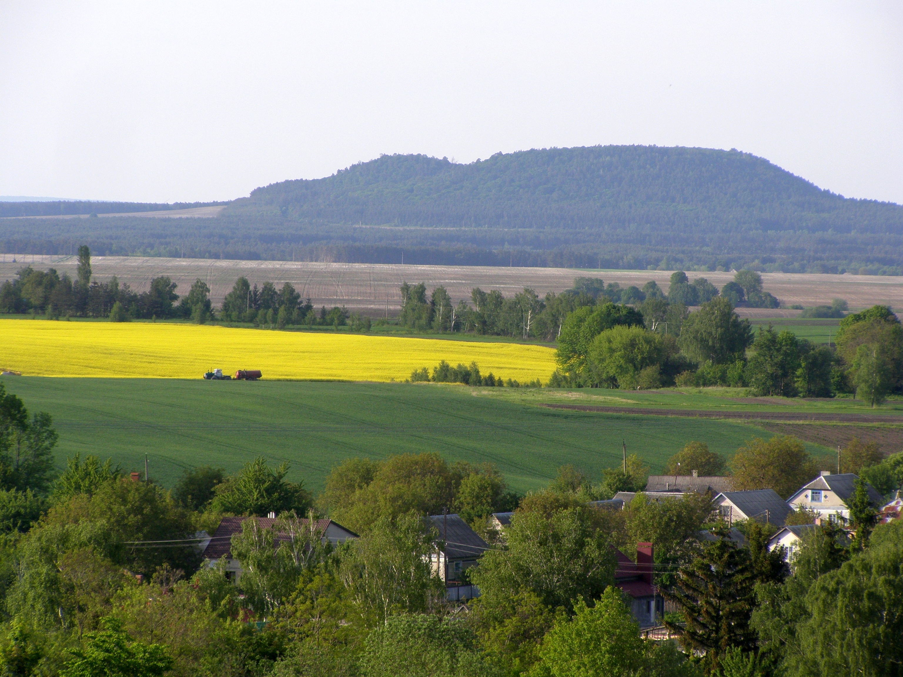 Божа Гора, вид з Почаєва, весна 2017 року